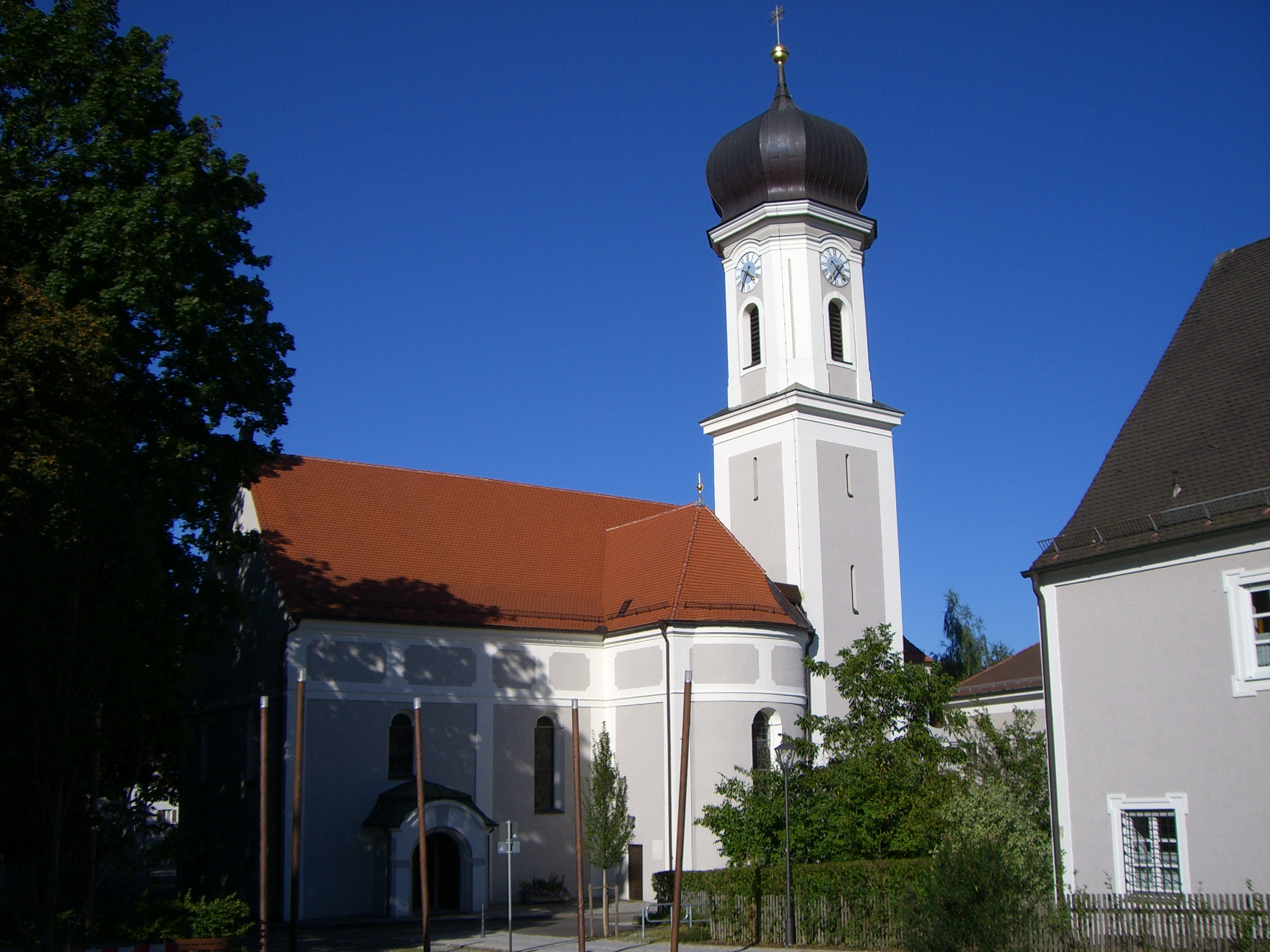 Kirche St. Vitus in Au/Hallertau (Landkreis Freising, Bayern, Deutschland)